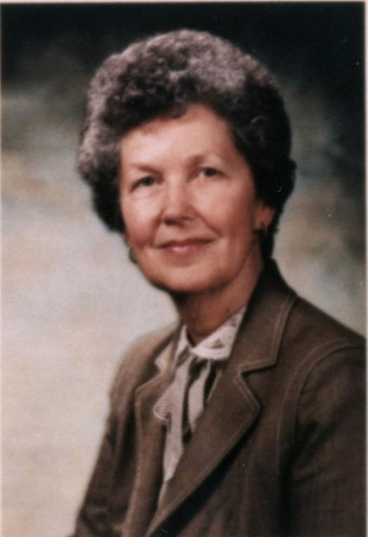 Sen Barbara Granlund